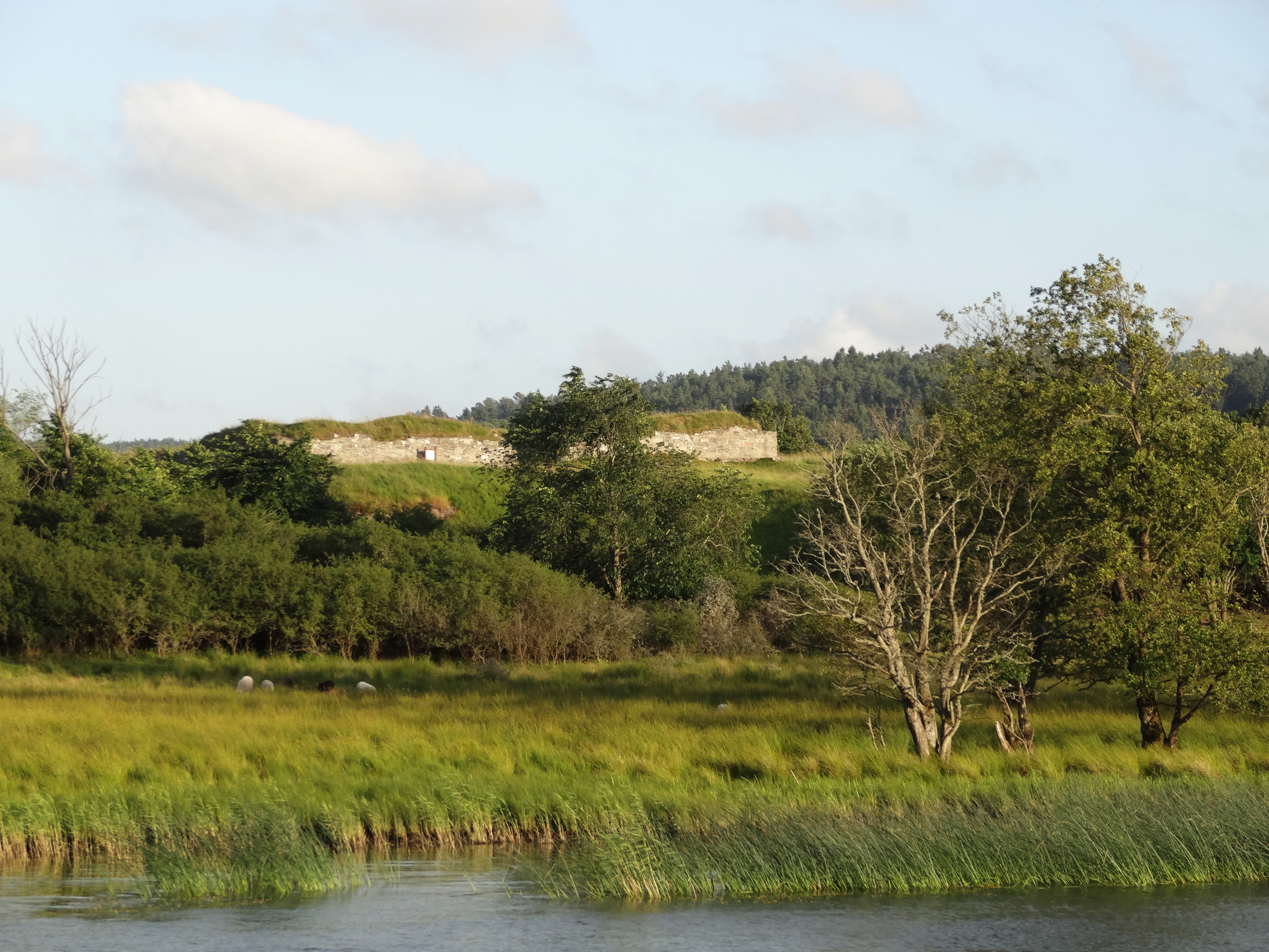 Nordre älv med Ragnhildsholmens ruin i bakgrunden.